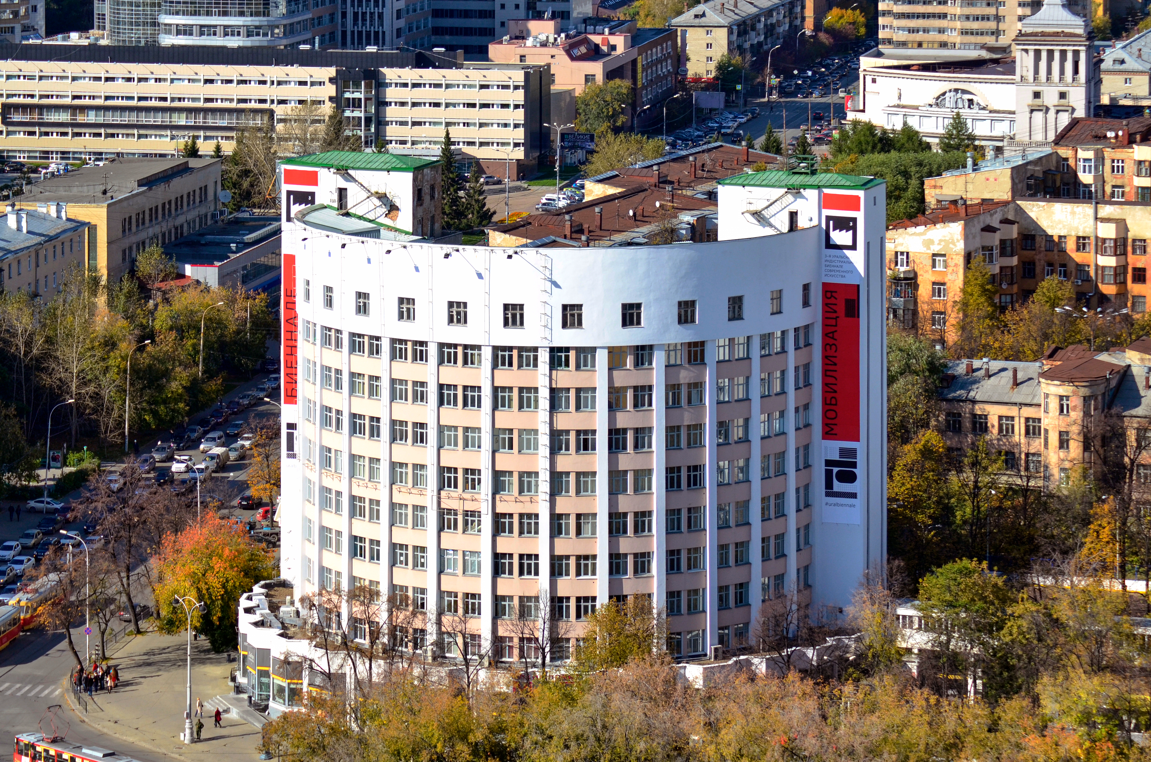 гостиница «Исеть»: проспект Ленина, 69, корпус 1, Екатеринбург, Свердловская область